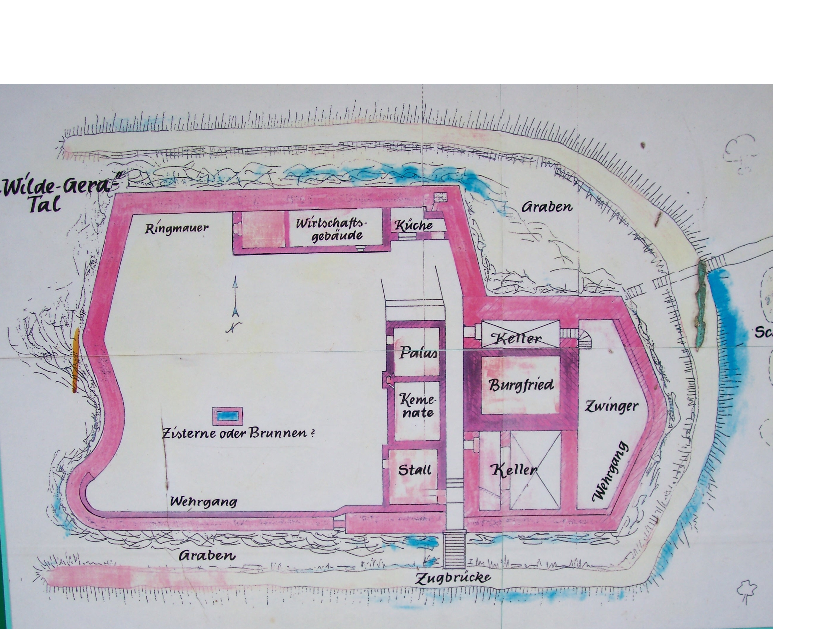 Grundriß der ehemaligen Raubritterburg in Dörrberg bei Gräfenroda (Deutschland).